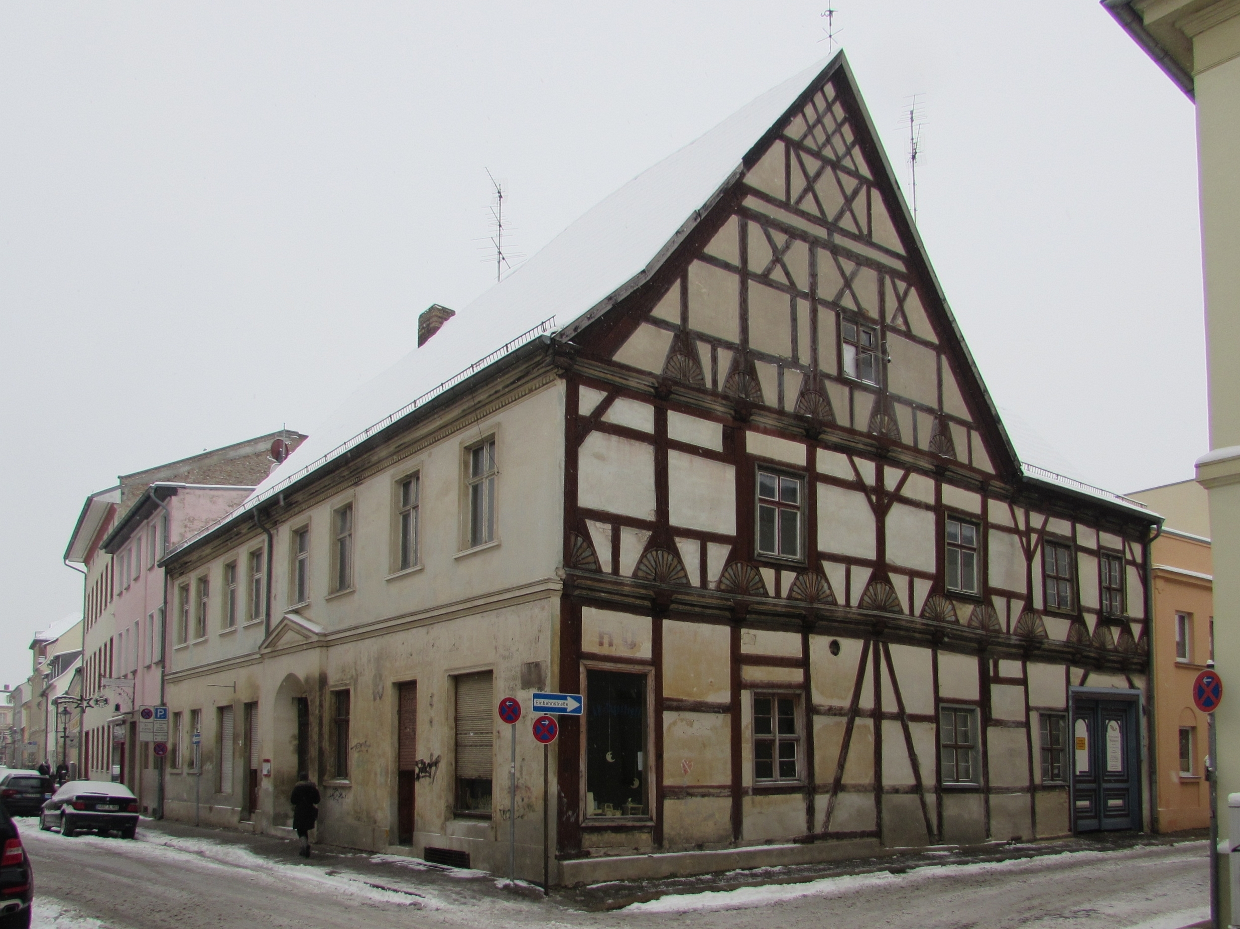 Denkmalgeschütztes sogenanntes Quitzowhaus, Bäckerstraße 11, Ecke Schusterstraße, Brandenburg an der Havel